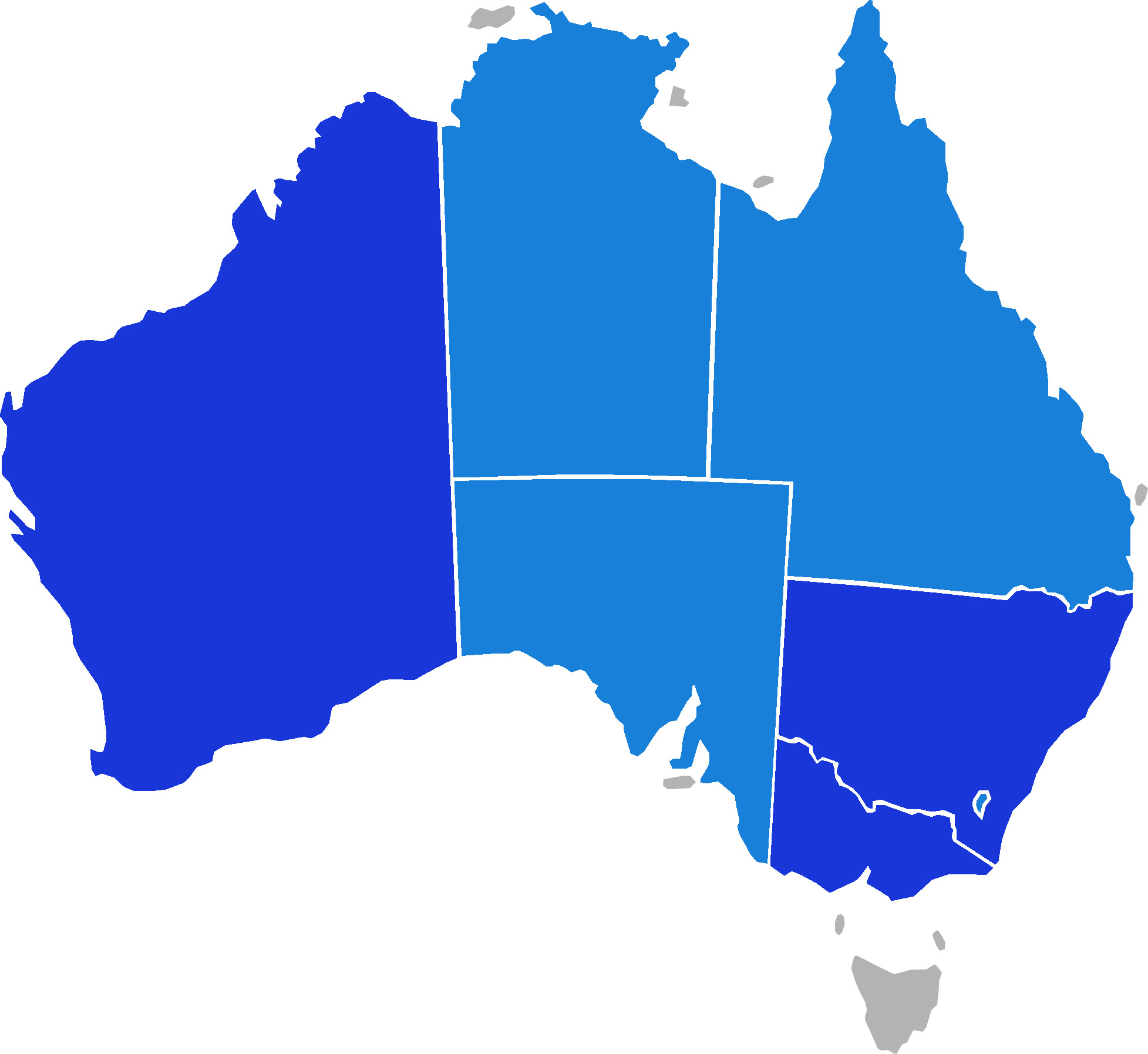 'ndrangheta in Australia per stato (2017)